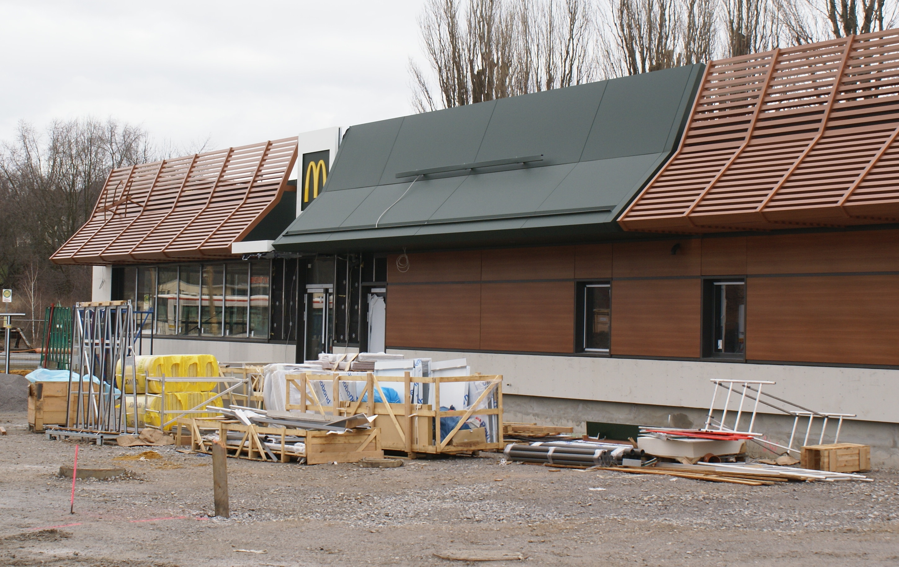 McDonalds Hemer in Bau